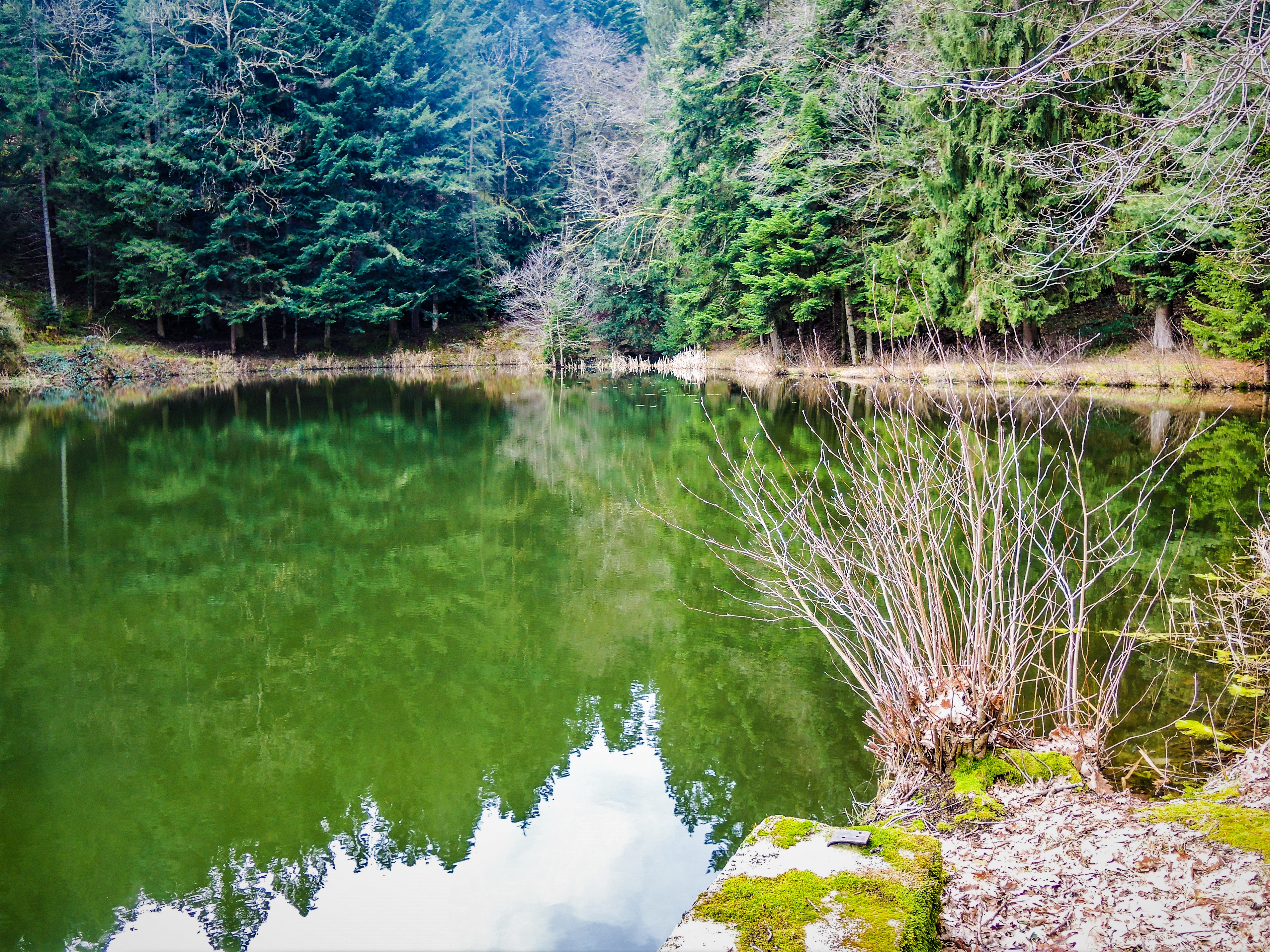 Etang du Stoerenburg. Mitzach. Haut-Rhin.